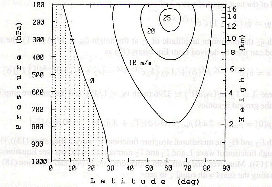 Zonaler Wind vs.Breite und Höhe